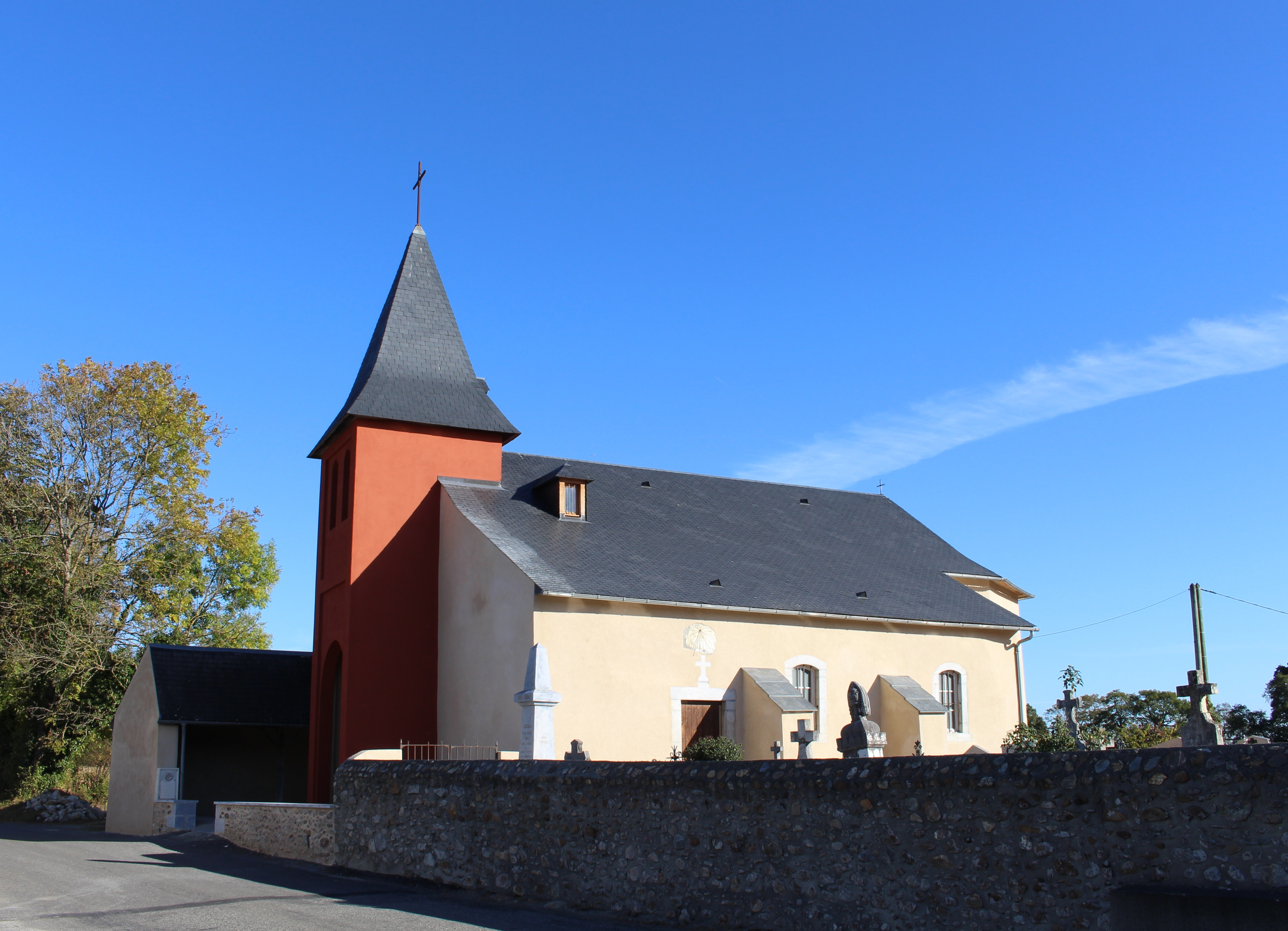 Église Notre-Dame-de-l'Assomption d'Escala (Hautes-Pyrénées)